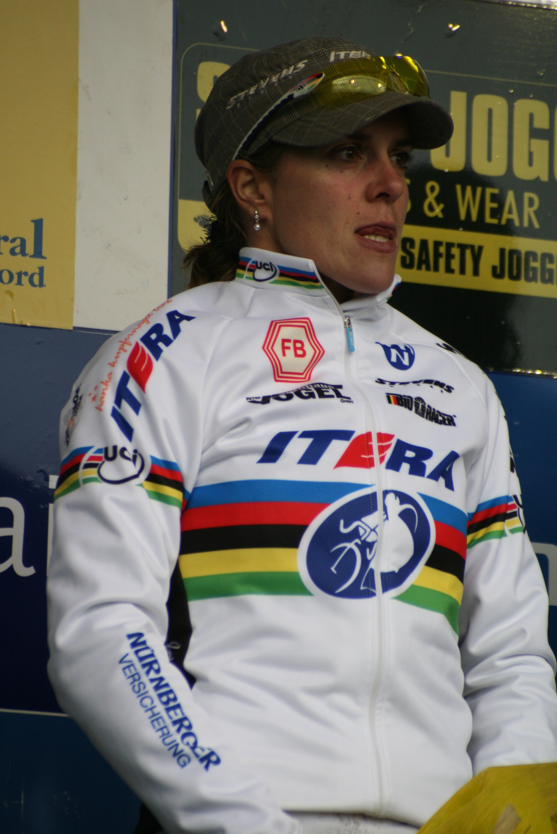 Hanka Kupfernagel dans le Maillot arc-en-ciel du du Champion du Monde de cyclo-cross, Grand Prix Lille Métropole 2009